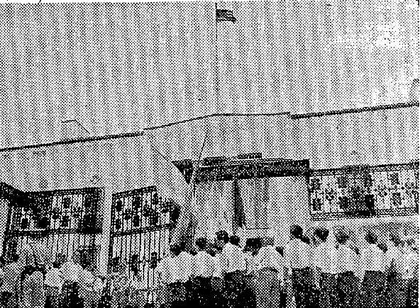 アメリカ大使館に迫る全学連デモ隊